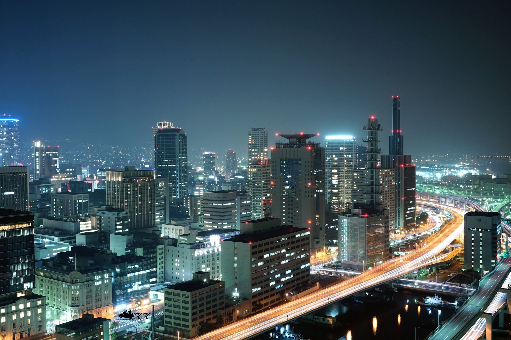 中文（台灣）: 從神戶大倉飯店31樓俯瞰神戶夜景。